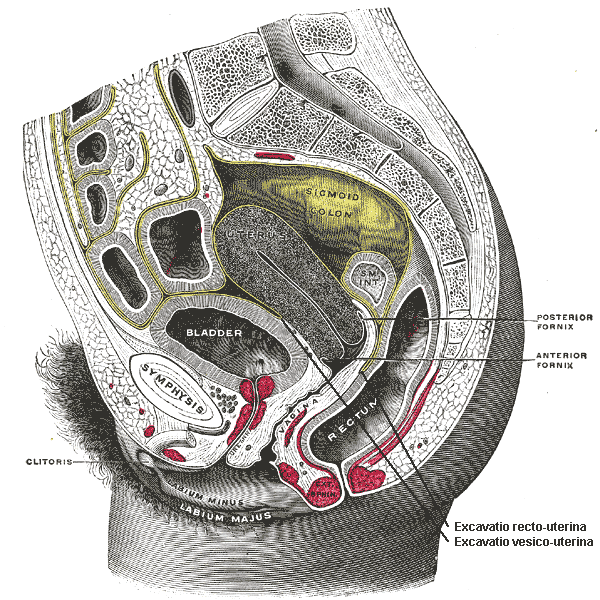 Weibliches Becken Median